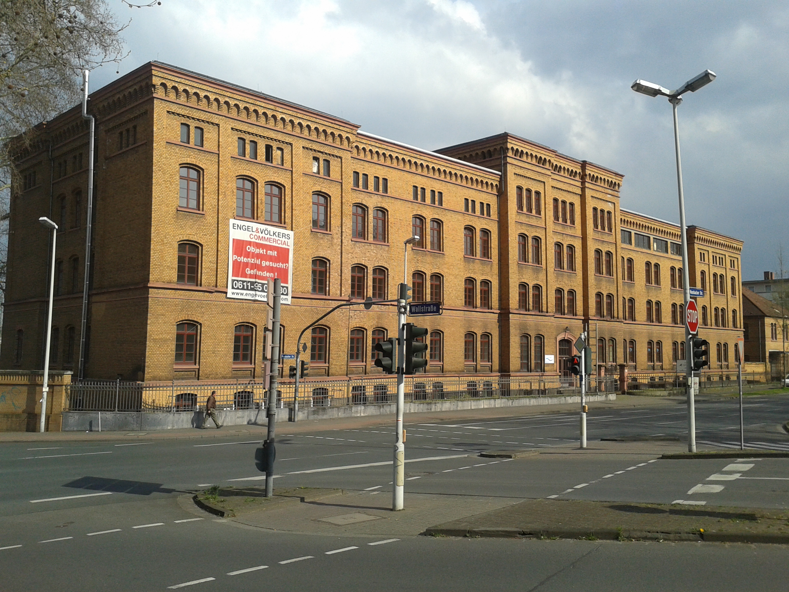 Baudenkmal "Neue Golden-Ross-Kaserne", Mombacher Straße 56 in Mainz